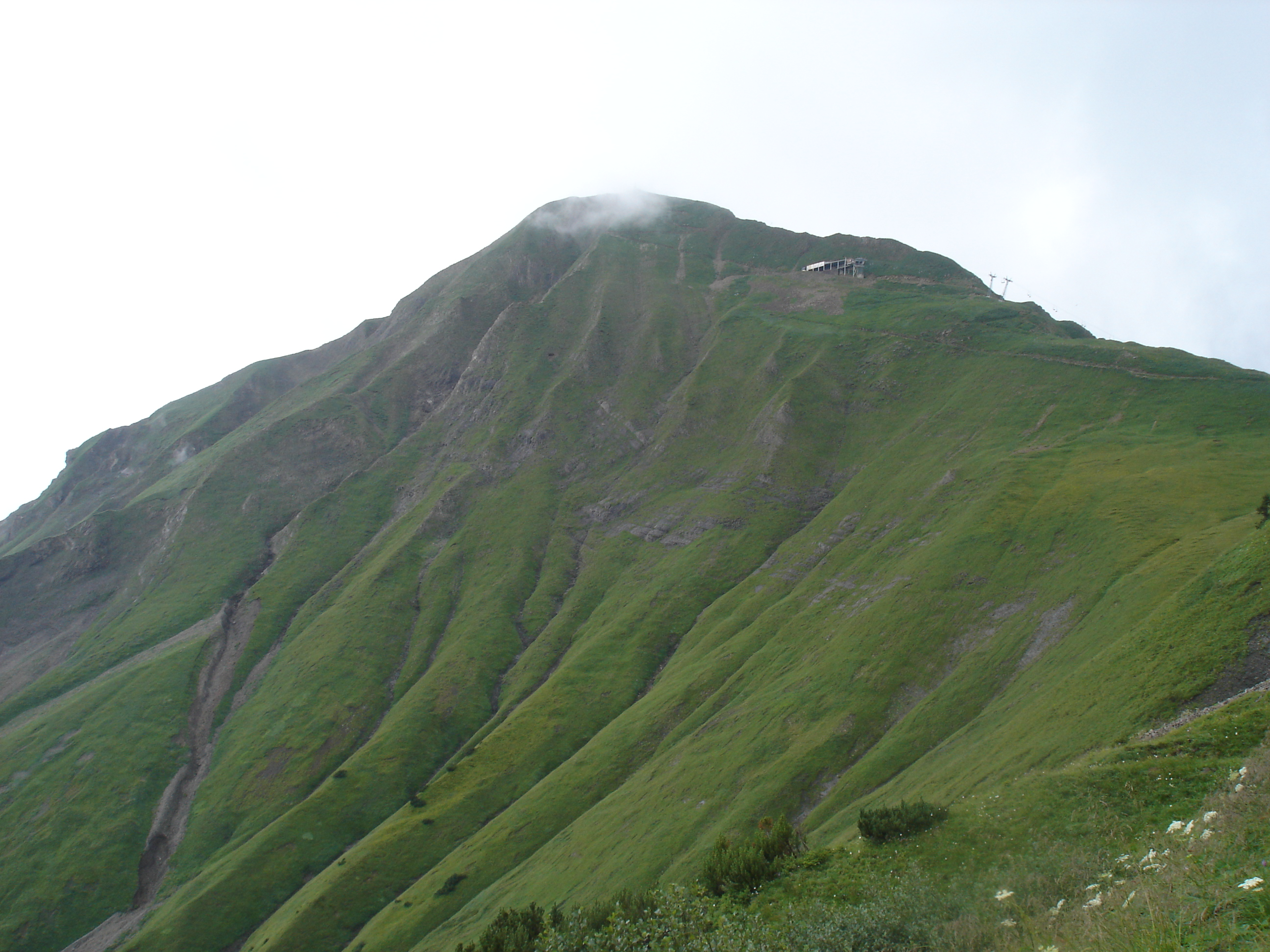 Brienzer Rothorn von Südost